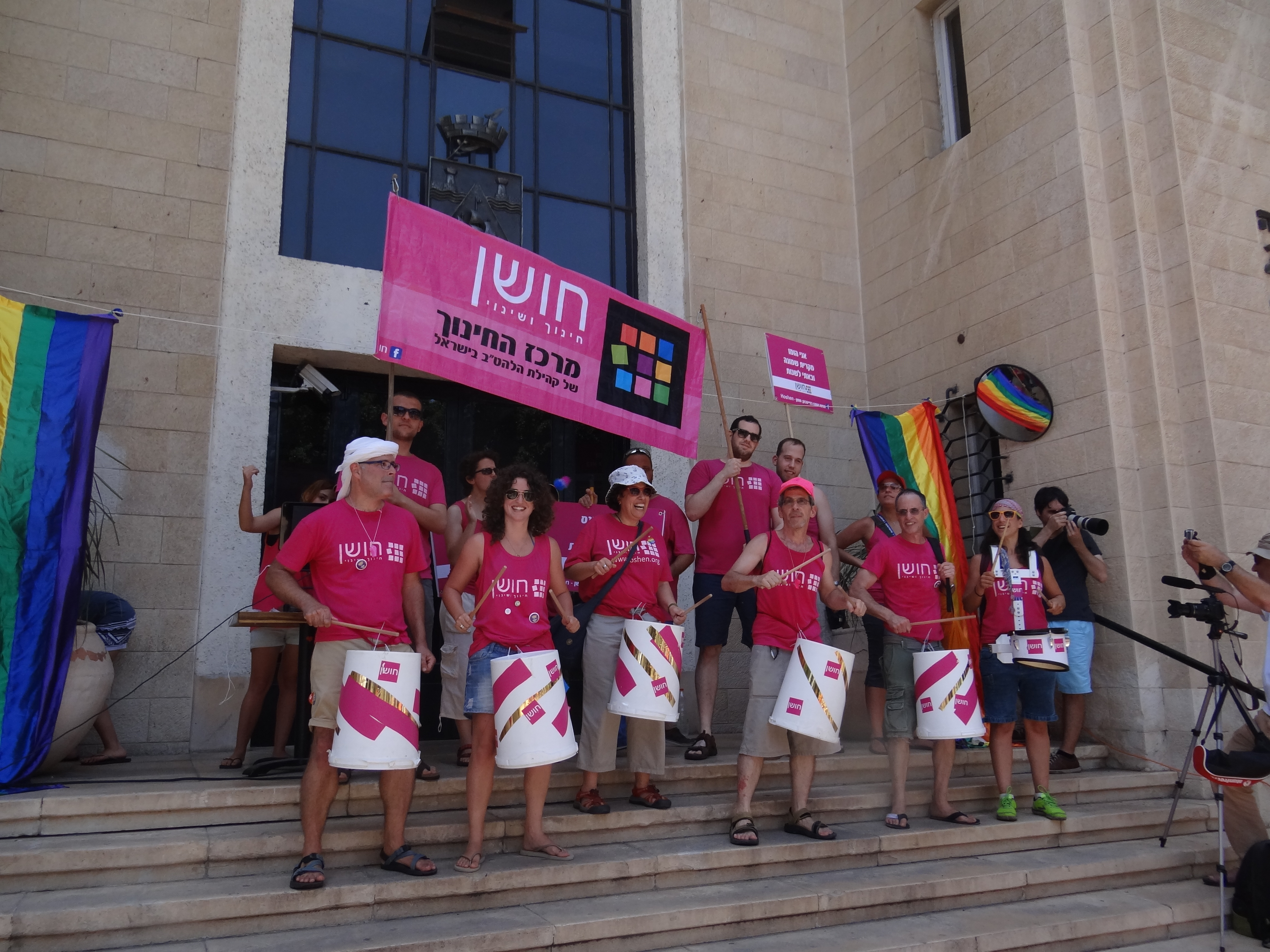 מצעד הגאווה בחיפה שהתקיים ב-27 ביוני 2014. תחילתו הייתה ברחבה ברחוב הנביאים 26 פינת אחד העם. במקום הזה התחילה ההתכנסות. בשעה 12:00 יצא המצעד לדרך בעוברו ברחוב הנביאים לכיוון צפון, פנה ברחוב הרצל עד בית הקרנות שם פנה לרחוב ביאליק, חצה את רחוב החלוץ ועד רחוב חסן שוקרי ורחבת העירייה. שם התקיים מופע ונישאו נאומים. אנשי ארגון חושן ברחבה שלפני בניין עיריית חיפה